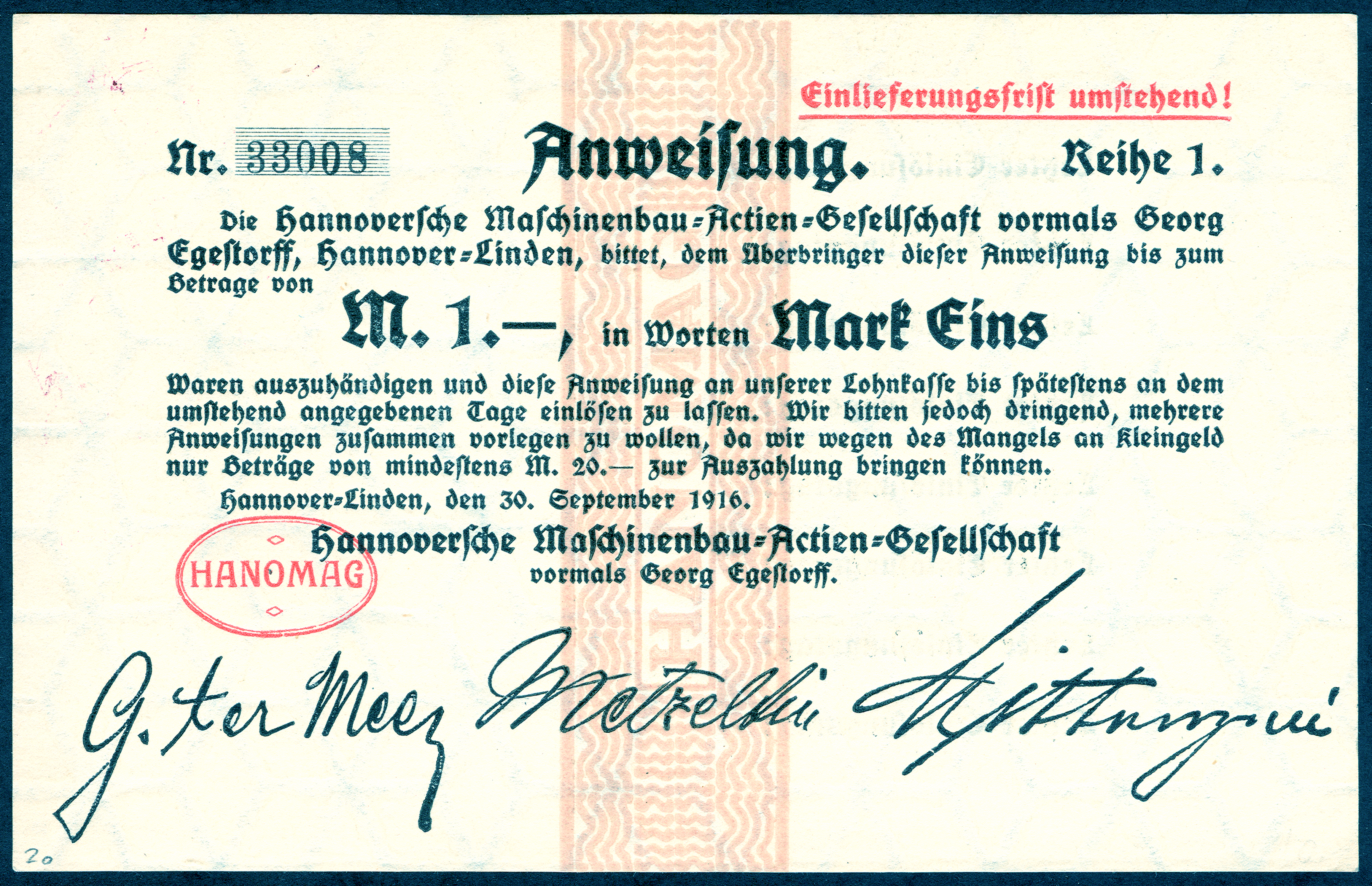 "Anweisung. Reihe 1. Nr. 33008 Einlieferungsfrist umstehend! Die Hannoversche Maschinenbau-Actien-Gesellschaft (Hanomag) vormals Georg Egestorff, Hannover-Linden, bittet den Überbringer dieser Anweisung bis zum Betrage von M. 1,-- in Worten Mark Eins Waren auszuhändigen und diese Anweisung an unserer Lohnkasse an dem umstehend anzugebenden Tage einlösen zu lassen. Wir bitten jedoch dringend, mehrere Anweisungen zusammen vorlegen zu wollen, da wir wegen des Mangels an Kleingeld nur Beträge von mindestens M. 20,-- zur Auszahlung bringen können. Hannover-Linden, den 30. September 1916 ..." Unterschriften von Gustav ter Mer, Erich Metzeltin und Albin Mittenzwei. Das Format des mit einem Wasserzeichen versehenen Blattes (Würfel) ist circa 15 cm x 9,5 cm